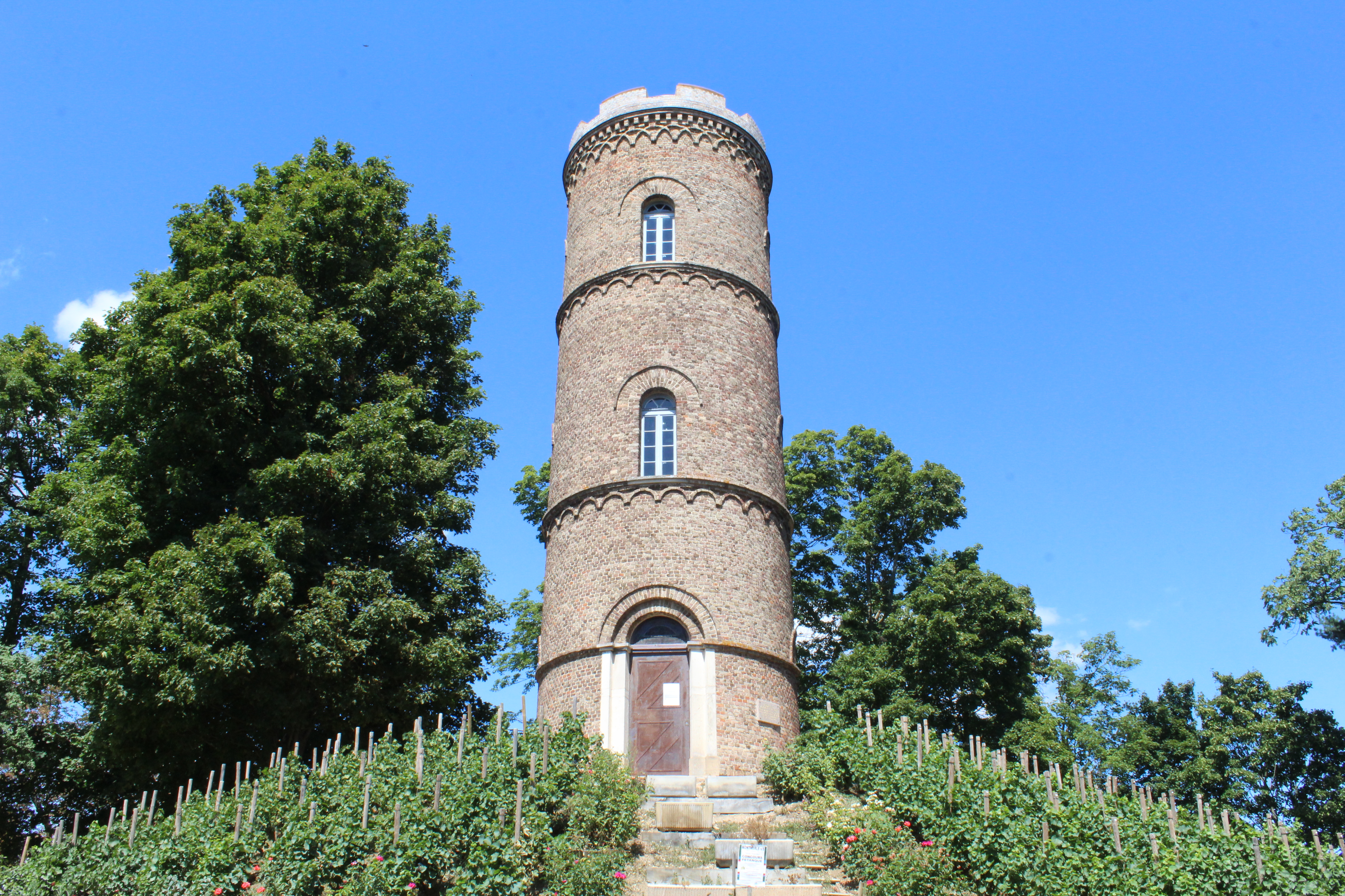 Tour des Minimes de Montmerle-sur-Saône.